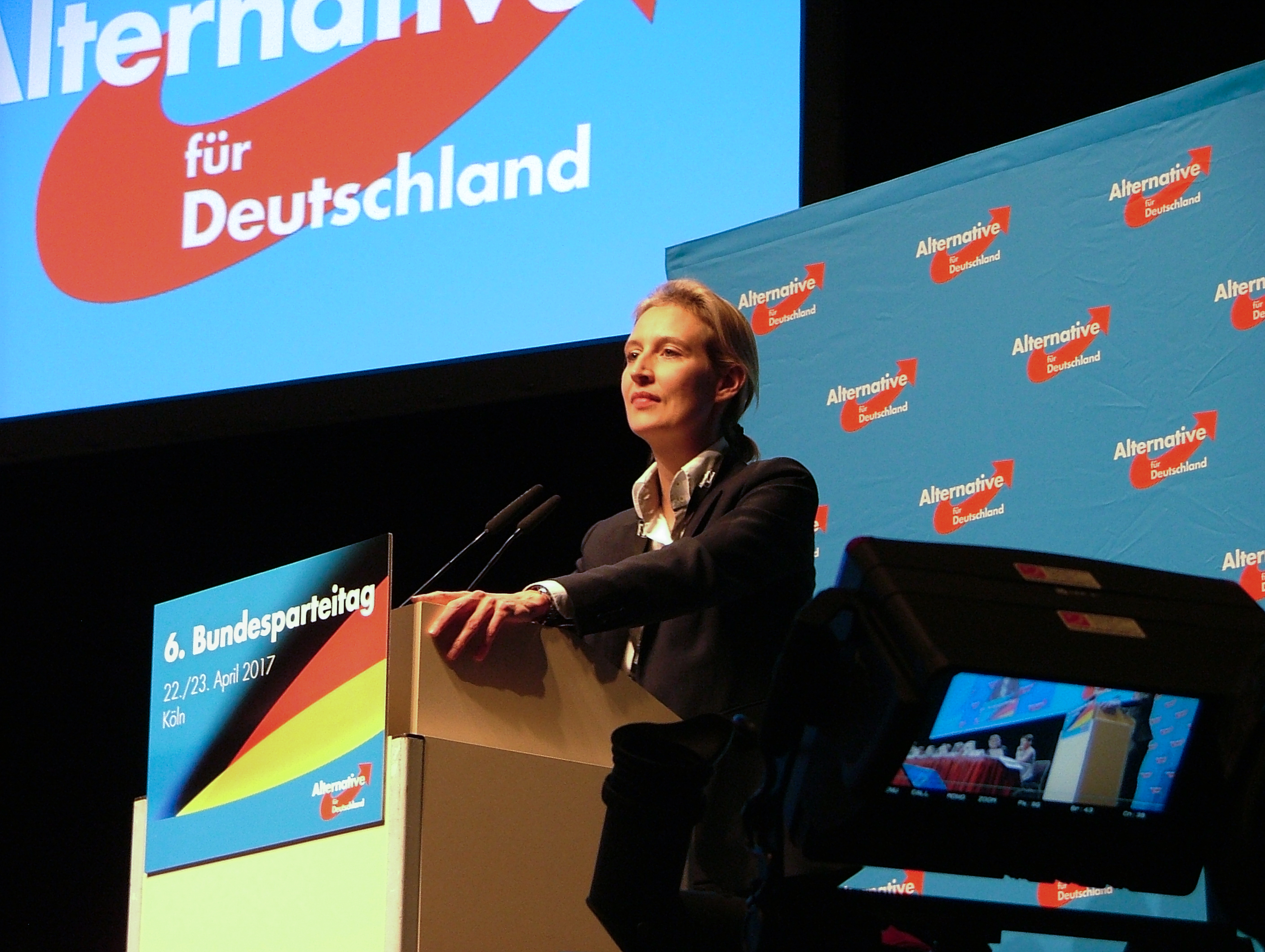 AfD Bundesparteitag am 23. April 2017 in Köln, MARITIM Hotel